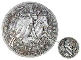 Philip I, Duke of Burgundy